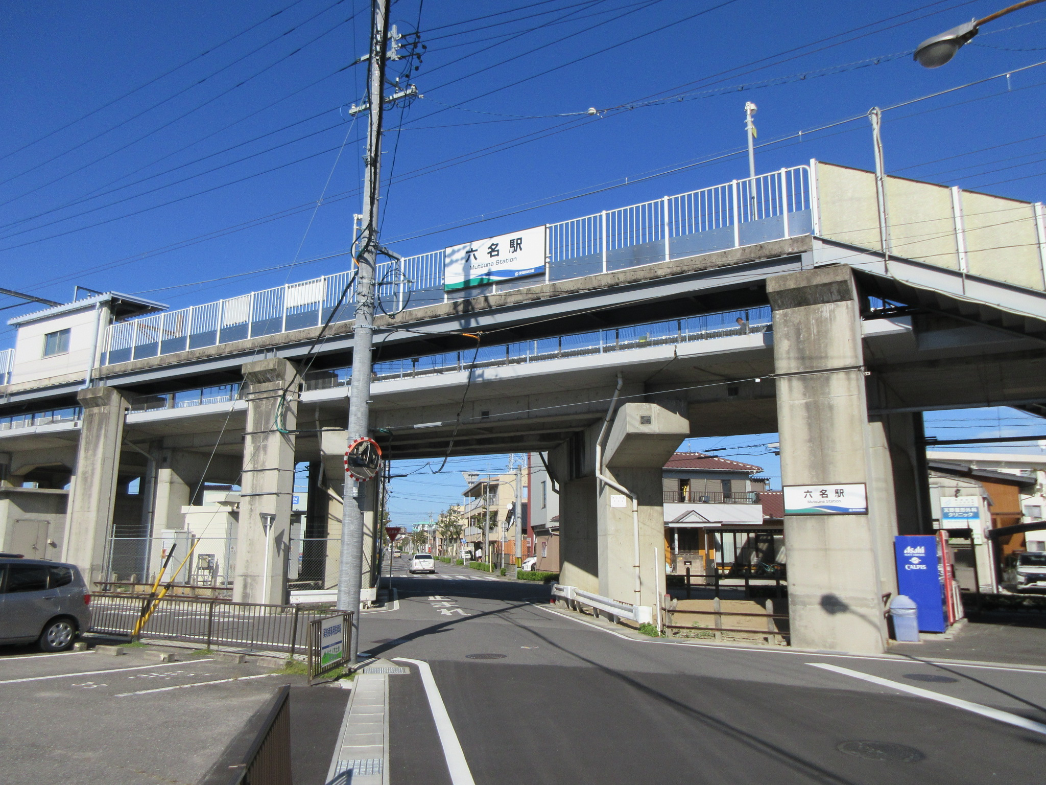 六名駅（岡崎市六名新町）